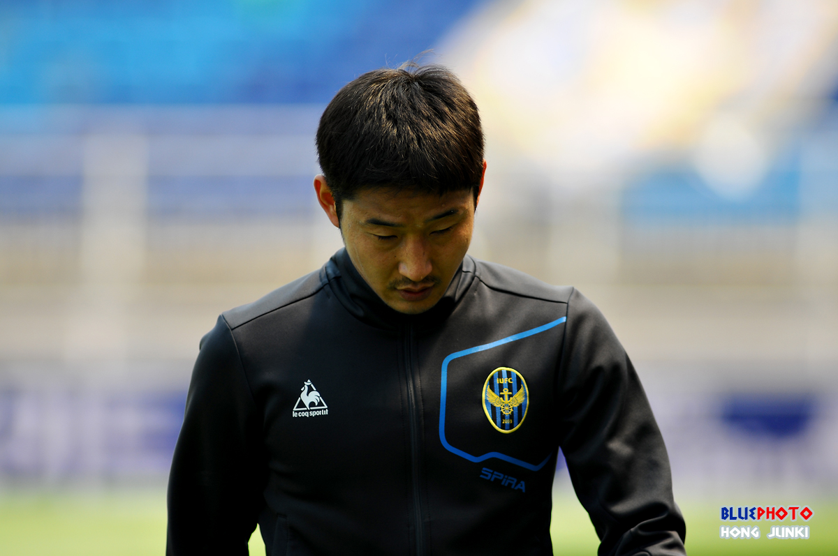 인천 유나이티드 이천수